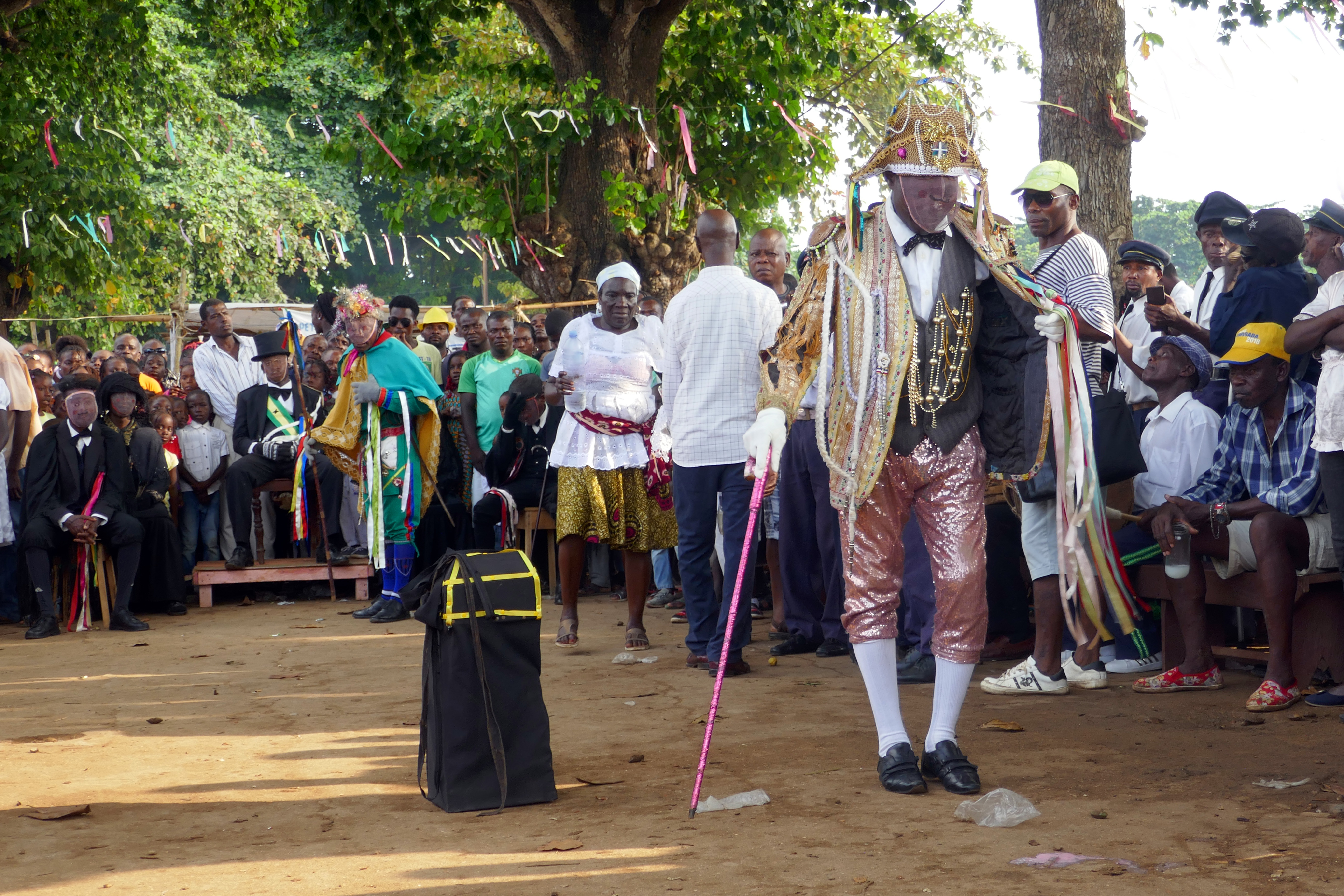 Tchiloli représenté devant l'église São Pedrão de São Tomé à l'occasion de la fête patronale. Le tchiloli est une forme théâtrale, musicale et dansée créée au XVIe siècle, jouée par des pêcheurs et des paysans. Traditionnellement elle met en scène la seule pièce du répertoire, La tragédie du marquis de Mantoue et de l'empereur Charlemagne". This is an image with the theme "Play" from: Sao Tome and Principe